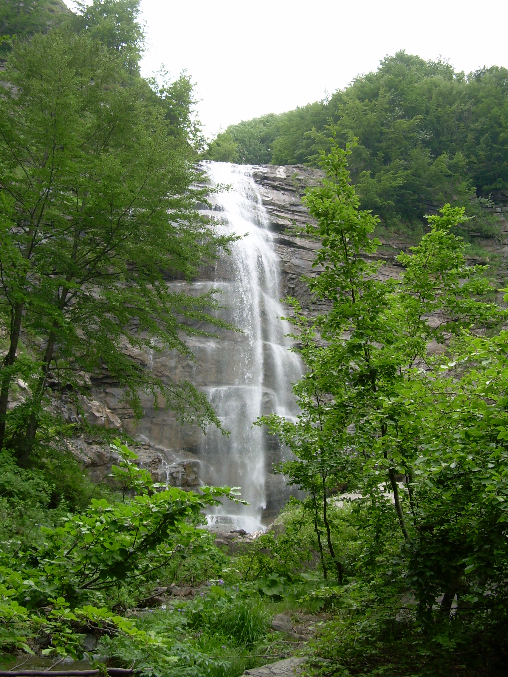 Le Cascate della Morricana alle pendici dei Monti della Laga (Teramo)